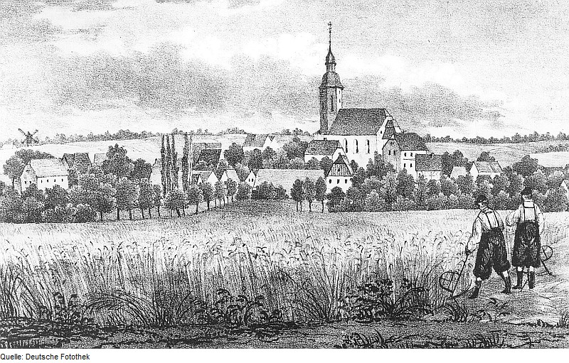 Original image description from the Deutsche Fotothek Großenstein. Ortsansicht mit Bockmühle